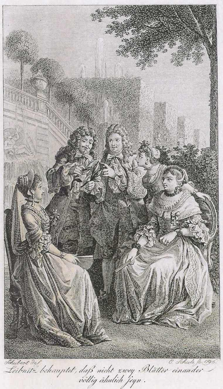 Leibniz mit Herzogin Sophie, Karl-August von Alvensleben und zwei Hofdamen im Herrenhäuser Garten